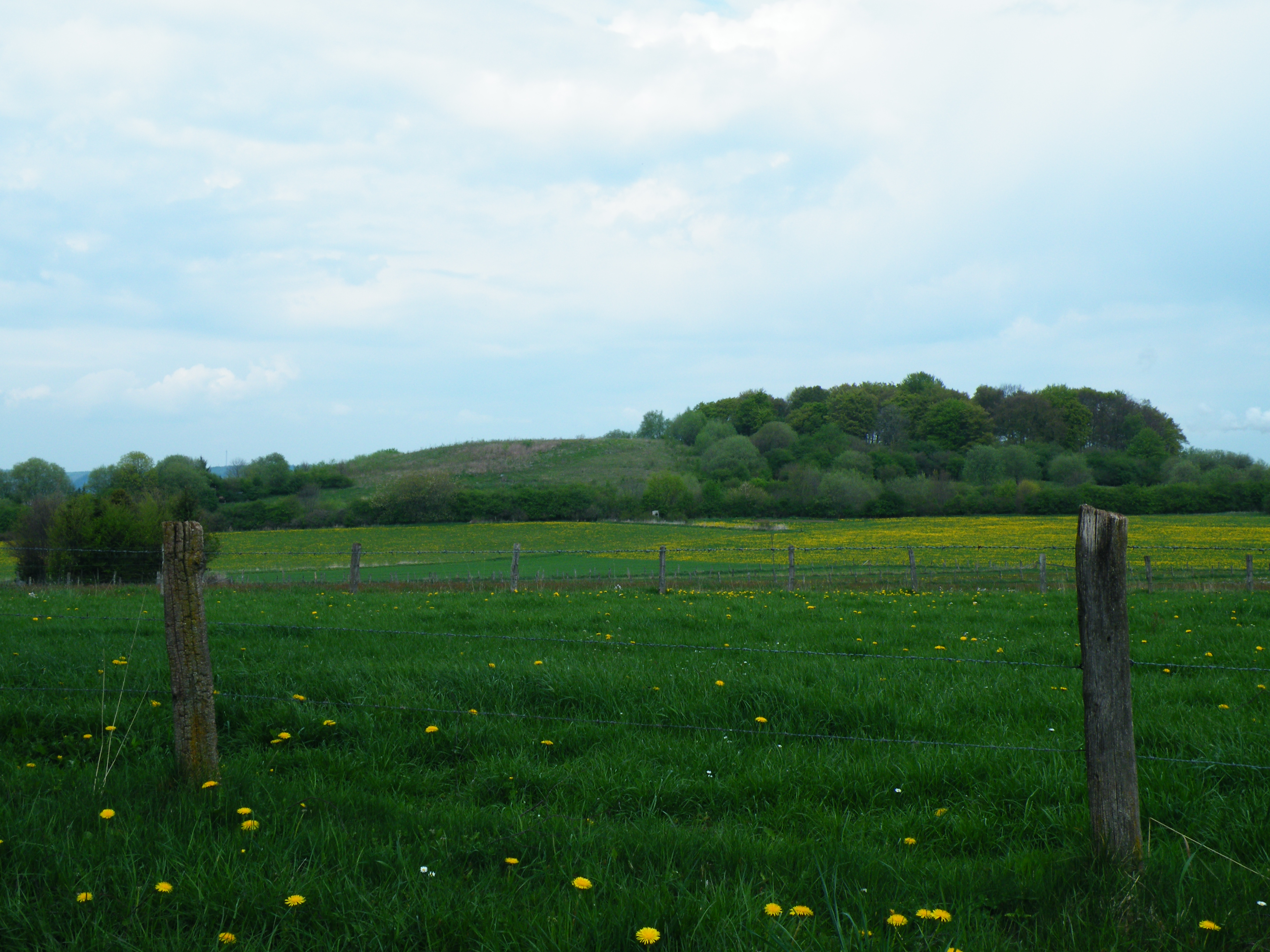 Westliche Bereich vom Naturschutzgebiet „Frettholz“ im Hintergrund auf Hügel. Im Vordergrund Landschaftsschutzgebiet „Grünlandkomplex am Frettholz“